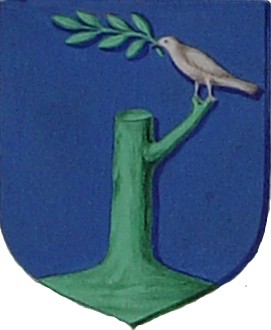 Armes de la famille de Duve Blasonnement: d'azur, à l'arbre coupé sur une terrasse de sinople, sur une branche duquel une colombe adextrée d'argent, tient dans le bec une branche d'olivier.